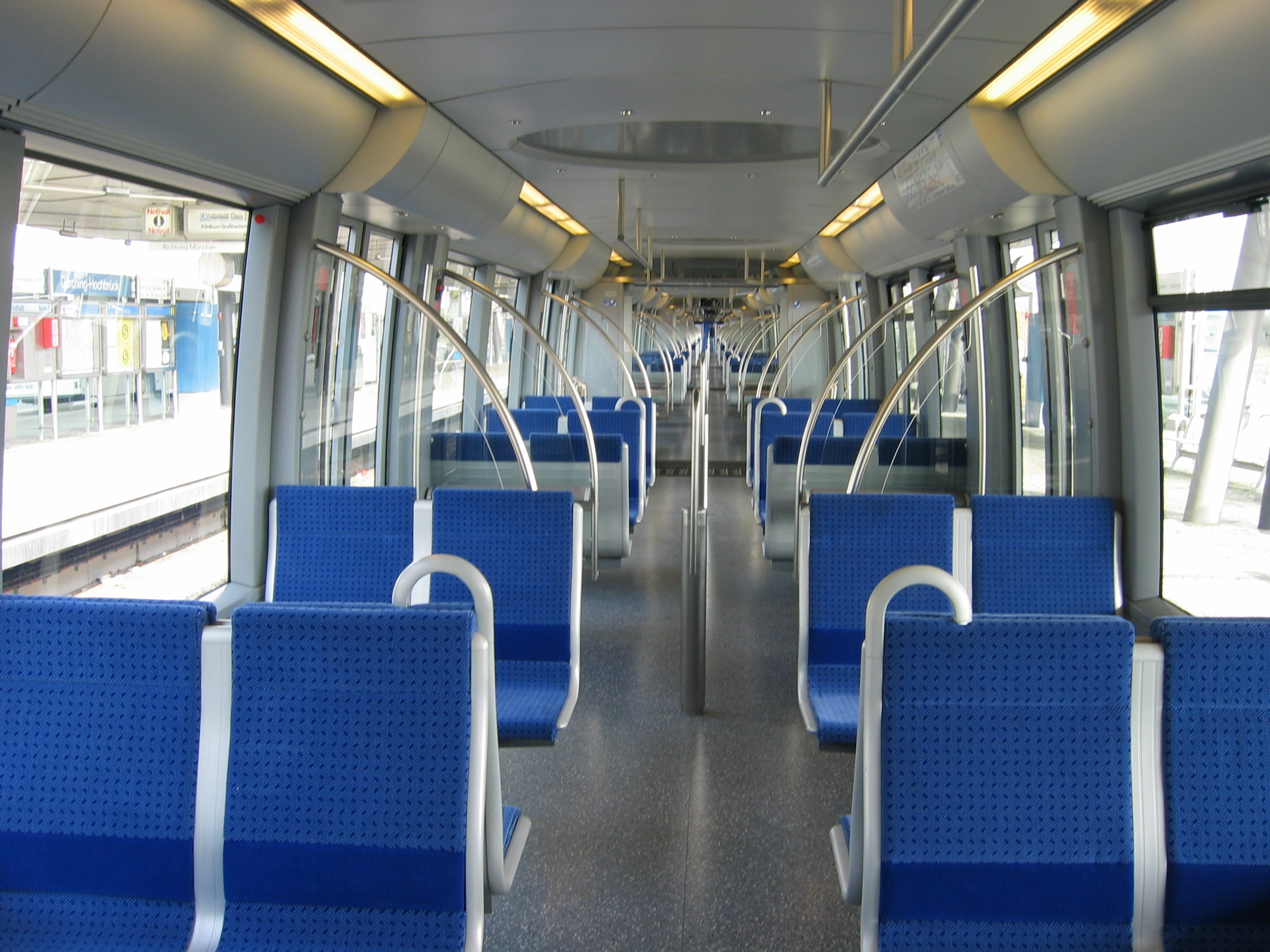 C-Zug of U-Bahn München (Type C 1.9, Car 610) at Garching-Hochbrück